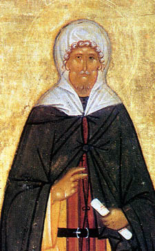 EphremSyrian